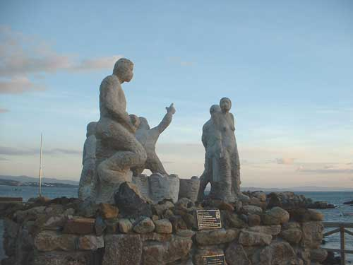 monumento a los voluntarios en San Vicente do mar luego de la catastrofe del prestige